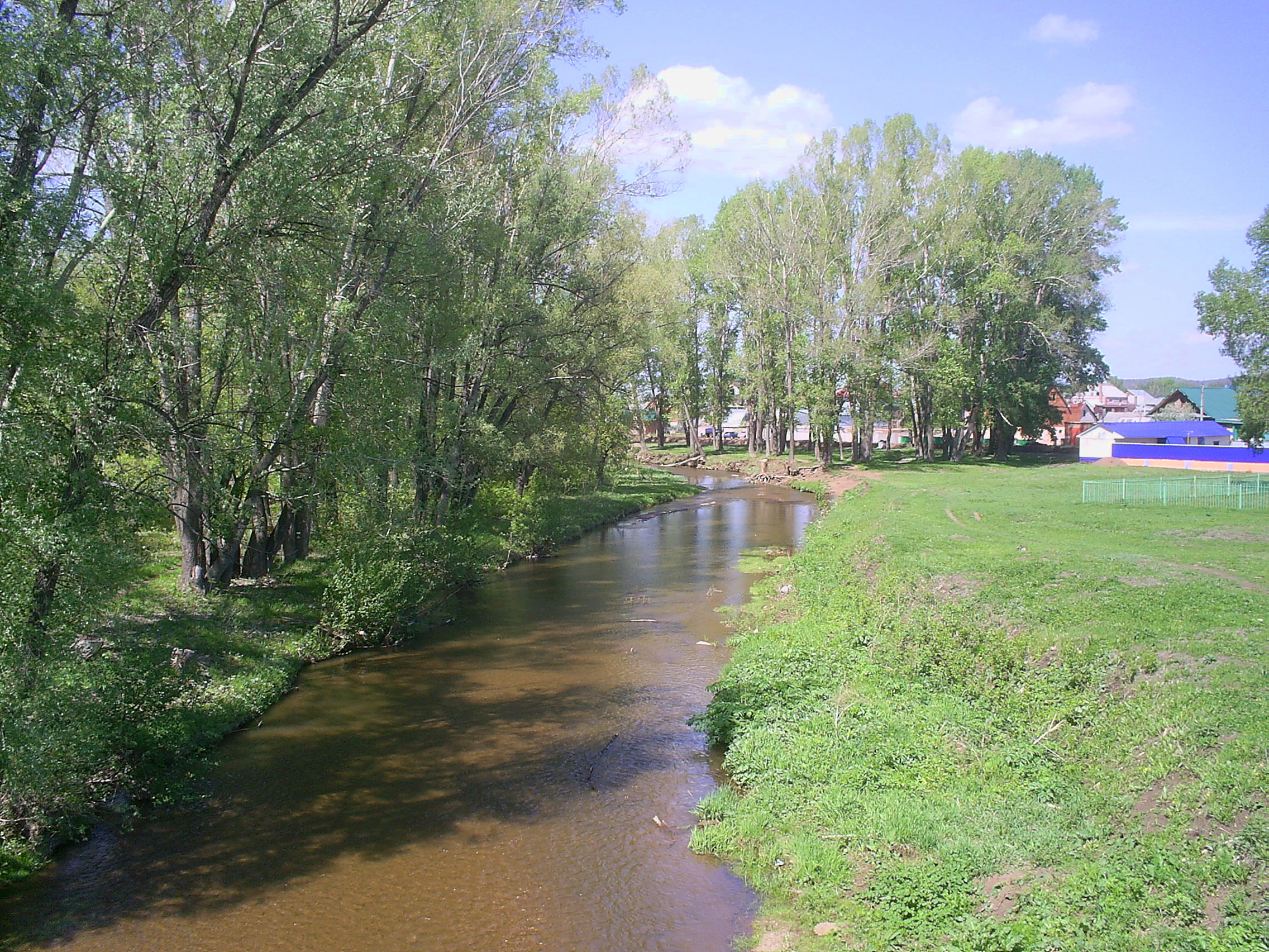 Тайрук 21.05.2011